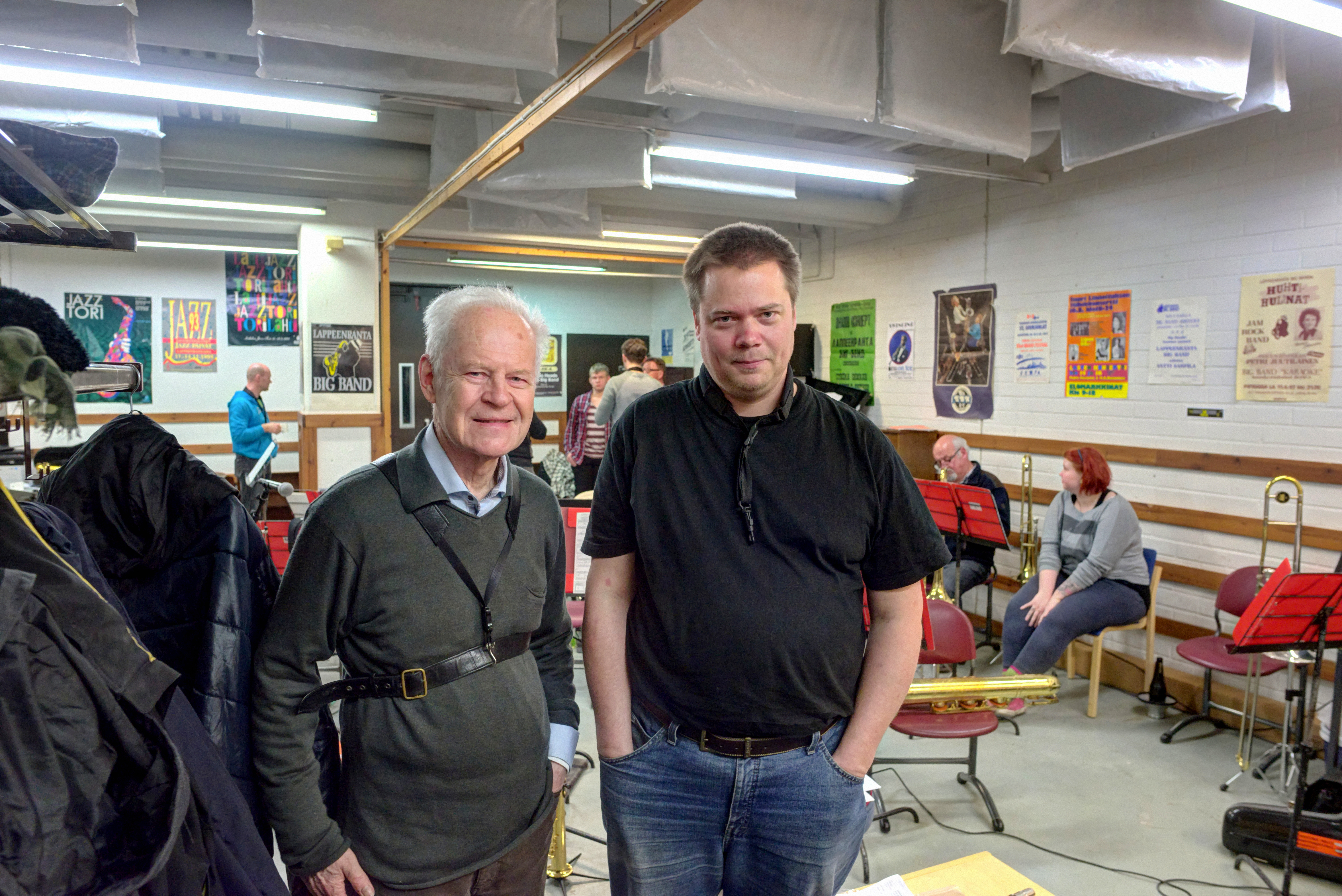 Pentti Lasanen ja Sille Kosonen Lappeenrannassa 2017